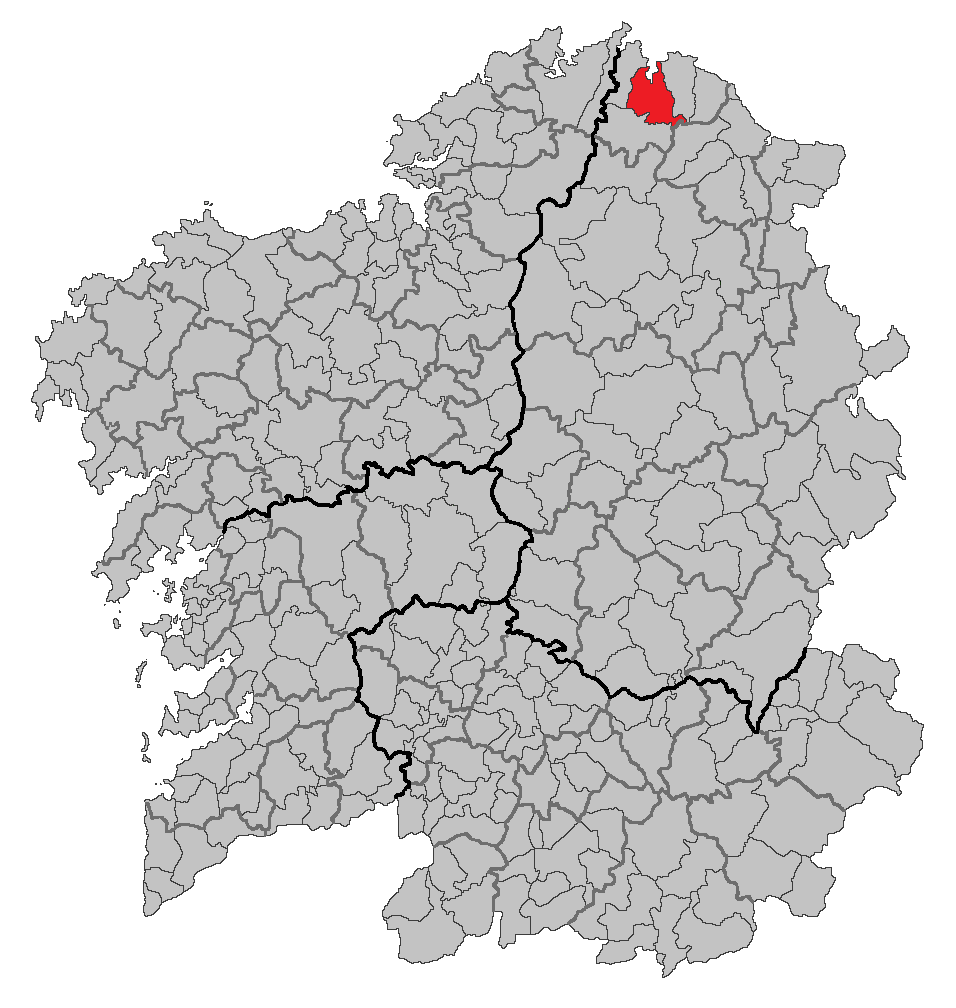 Mapa coa localización do concello de Viveiro.